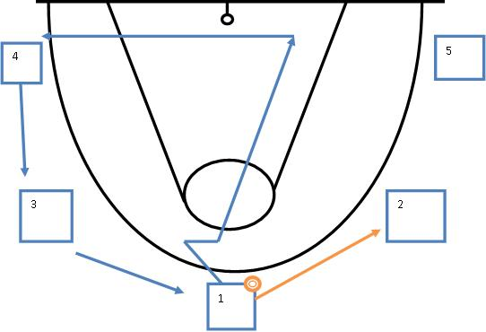 Zagrywka koszykarska (teoria)